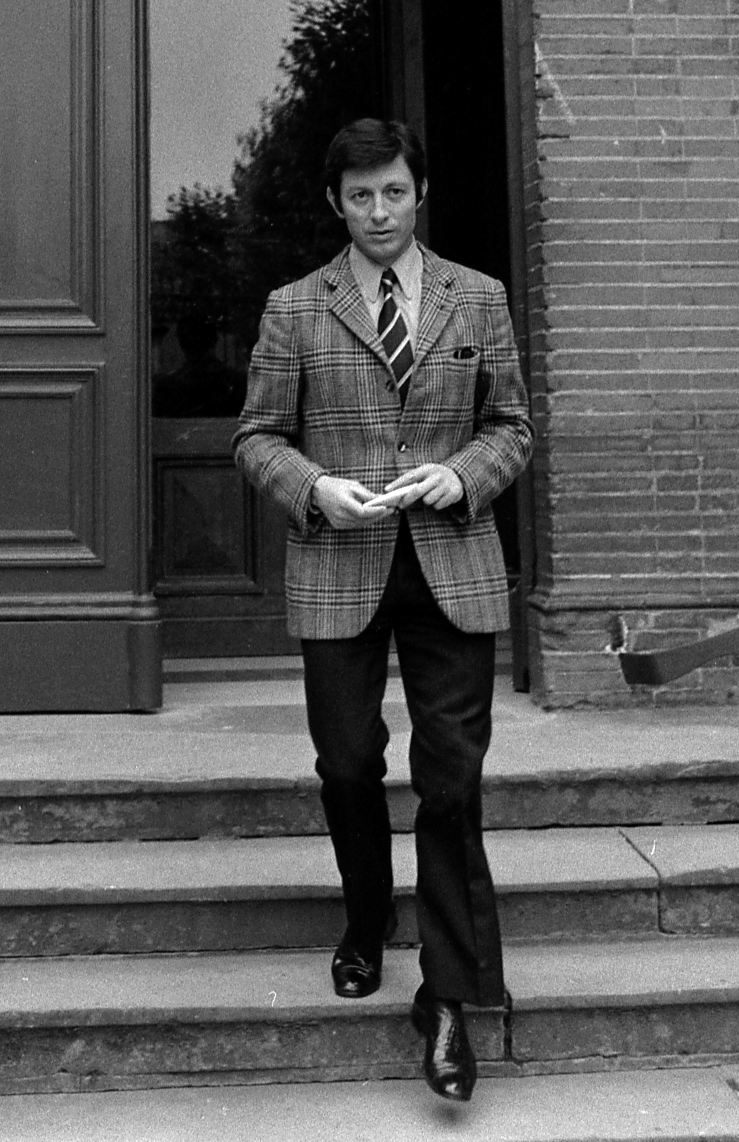 "Max Urbini, Riou, A. Dehaye, commissaire Boutevin". Cour du Palais de Justice, porte d'entreé de la Cour d'Appel. 5 octobre 1971. Vue de face de Pierre Danos (ancien joueur de rugby à XV) sortant du tribunal, venu témoigner au procès. Cliché pris lors du procès de René Vignal (ancien footballeur), accusé d'une série de braquages perpétués à Toulouse et dans la région bordelaise entre 1969 et 1970. Observation: Au côté de René Vignal, comparaissaient également MM. Francis Bataille, Roger Claverie, Roger Martin, Marcel Filiol, Jean-Pierre Arrou, Guy Martin, René Doncel et Jean-Louis Parrenin.